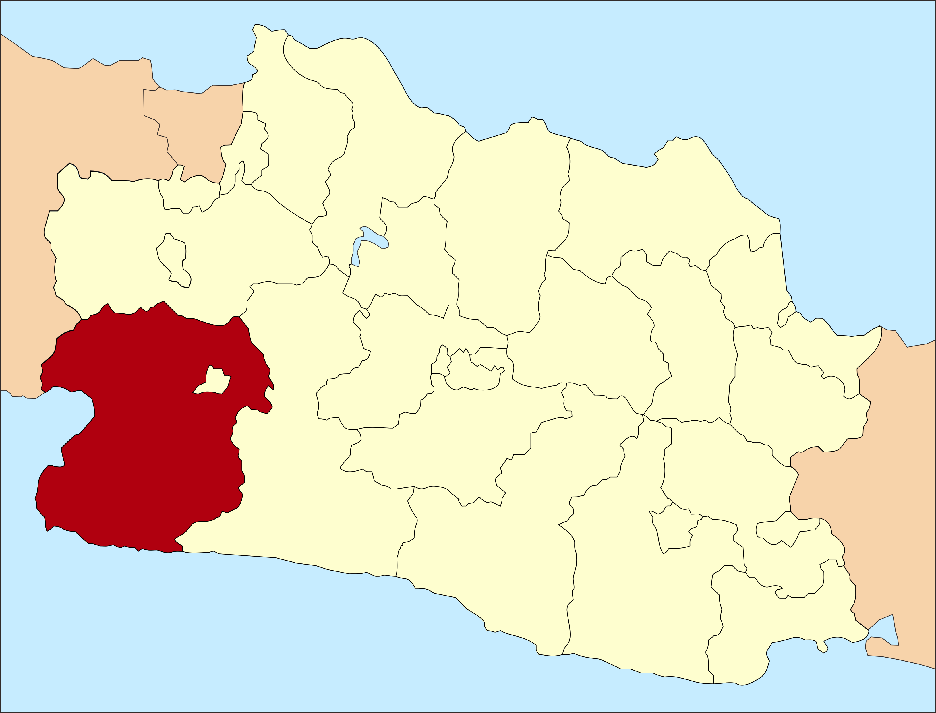 id.wp